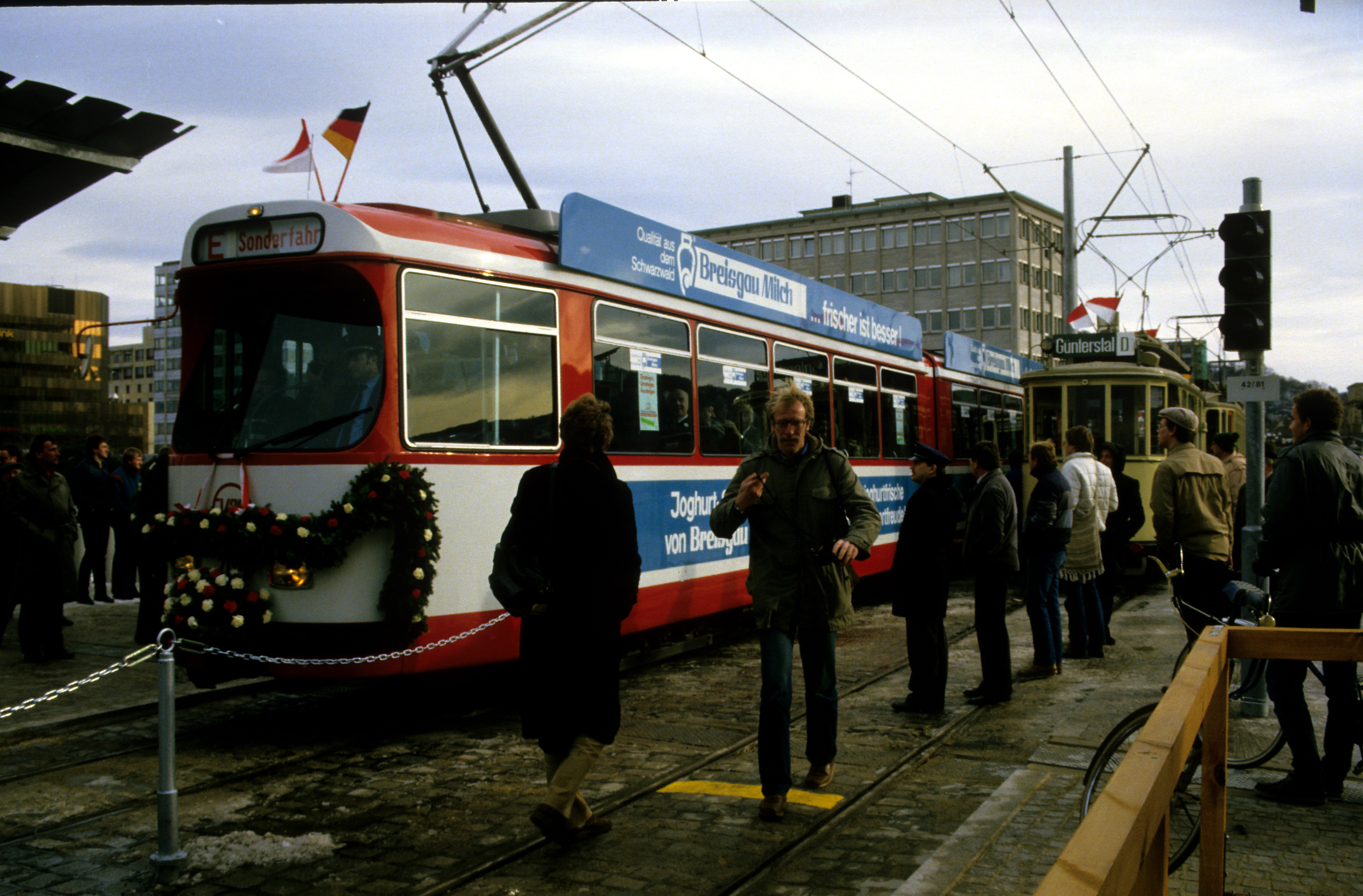 Feierliche Eröffnung der neuen Stadtbahnbrücke über das Bahnhofsgelände mit seinerzeit neuem GT 8 und einem sogenannten „Hobel“